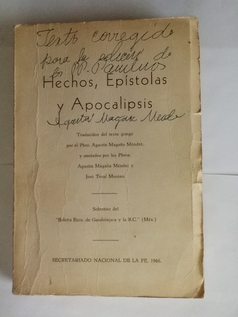 Hechos, Epístolas y Apocalipsis. Una de las primeras ediciones de la Biblia de la Burrita, traducción del P. Agustín Magaña Méndez, realizado por el Boletín Eclesiástico de Guadalajara (1966).